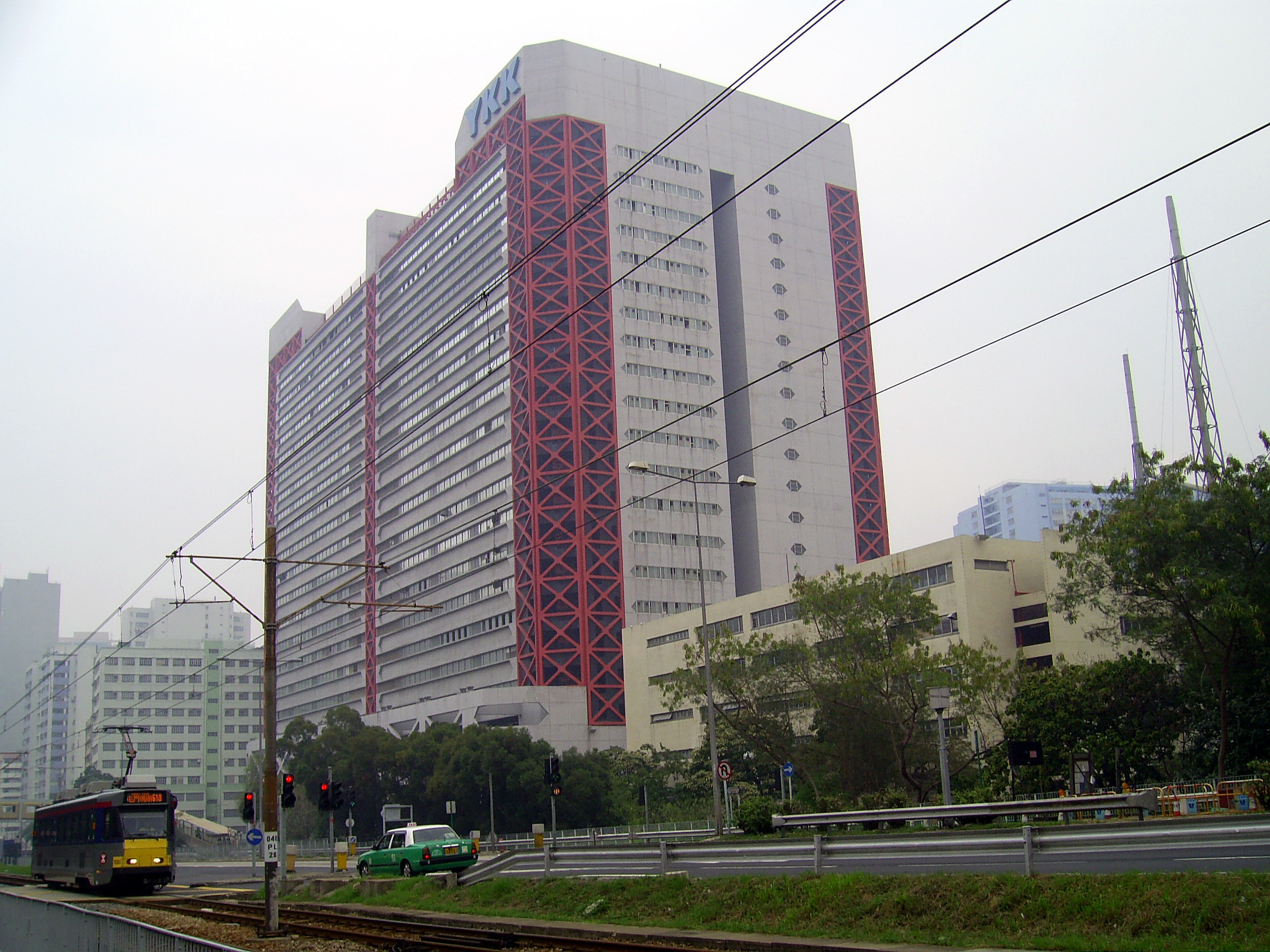 中文（香港）: 屯門區吉田大廈